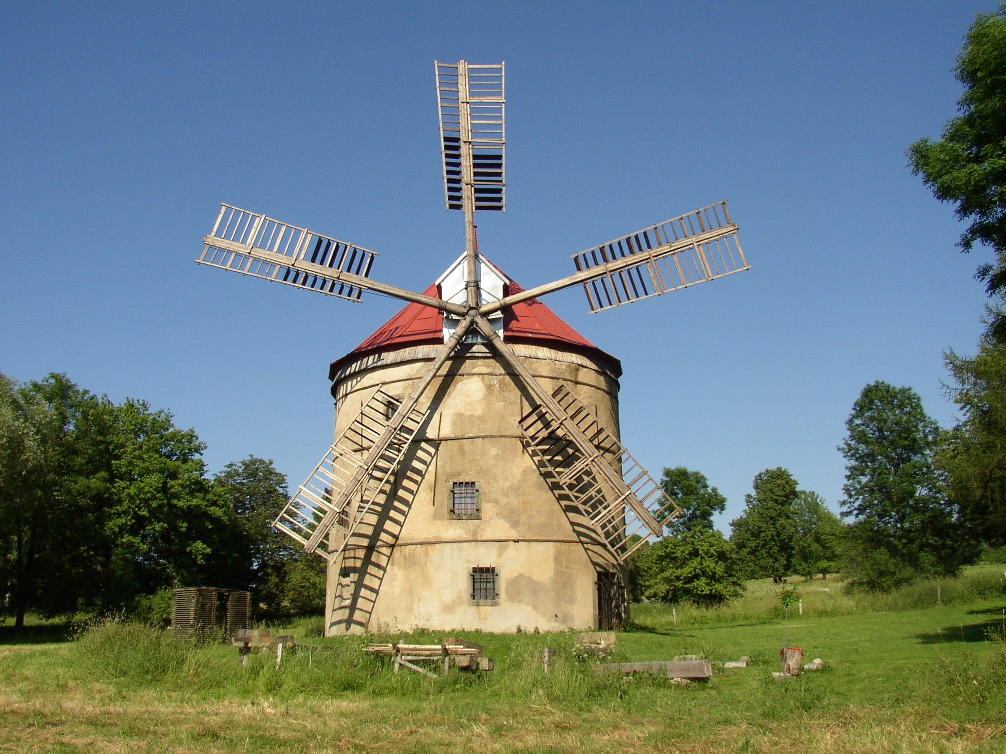 Větrný mlýn Světlík, stav ze dne 8.7.2010